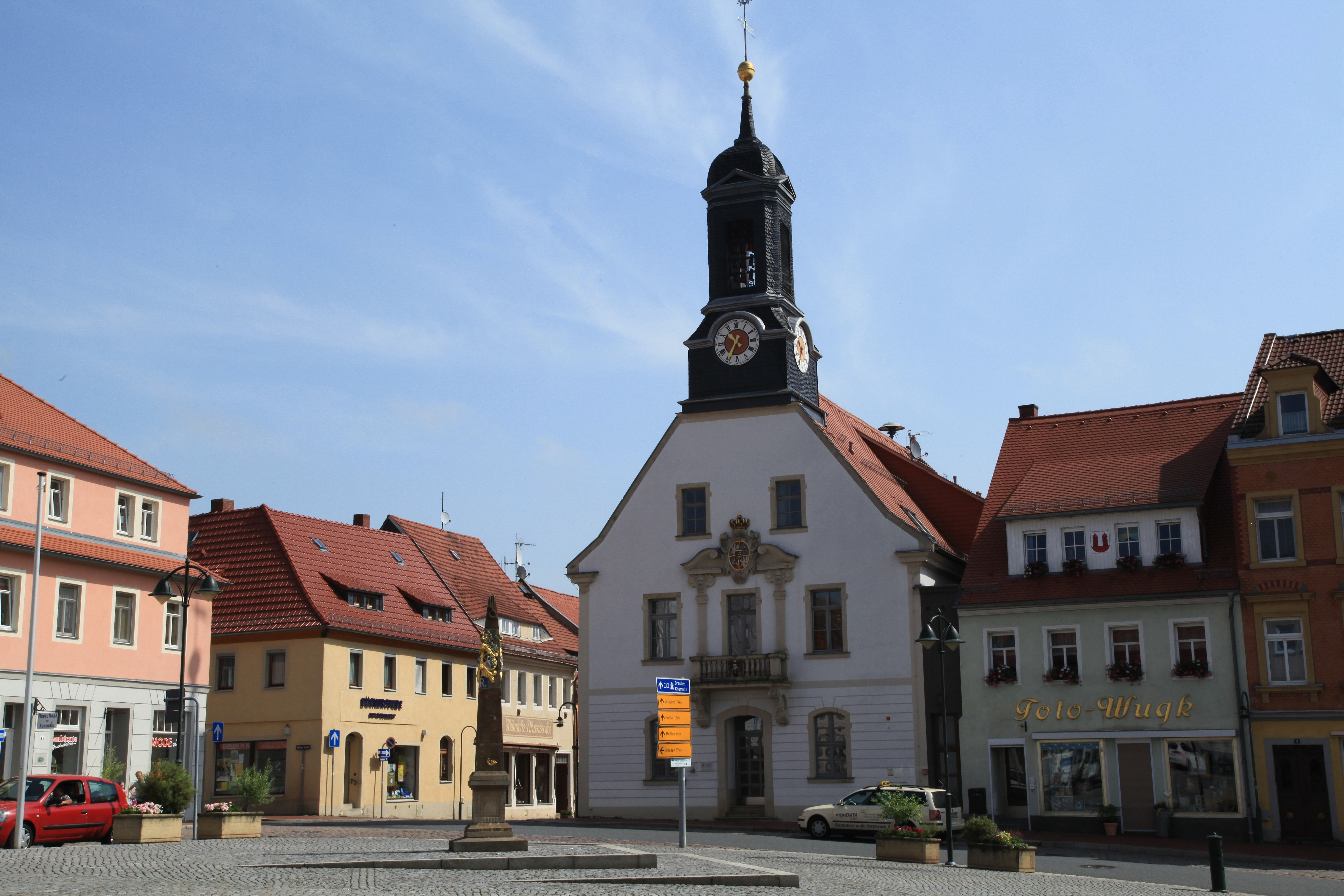 Markt in Wilsdruff